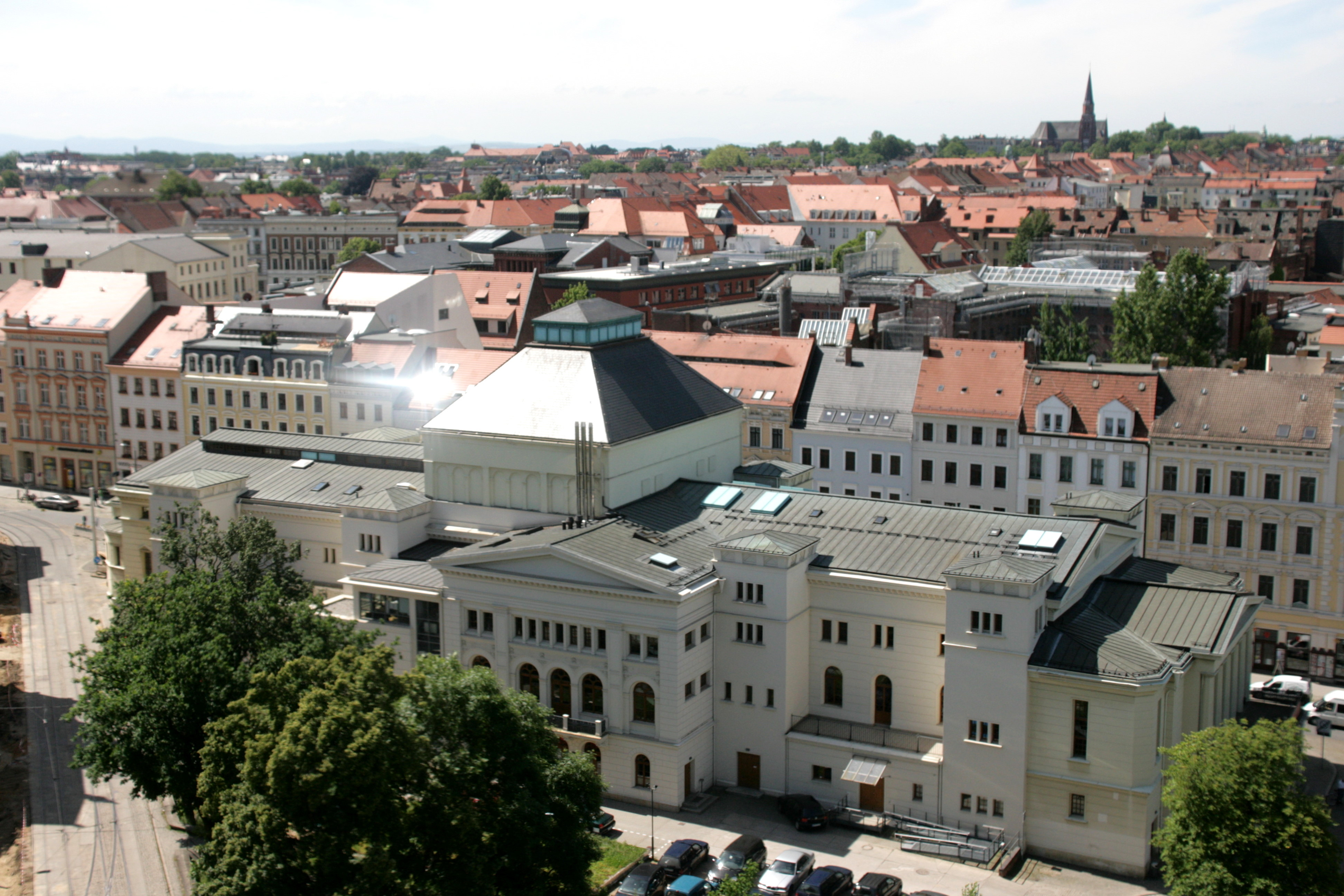 Theater Görlitz, Blick vom Reichenbacher Turm in Görlitz